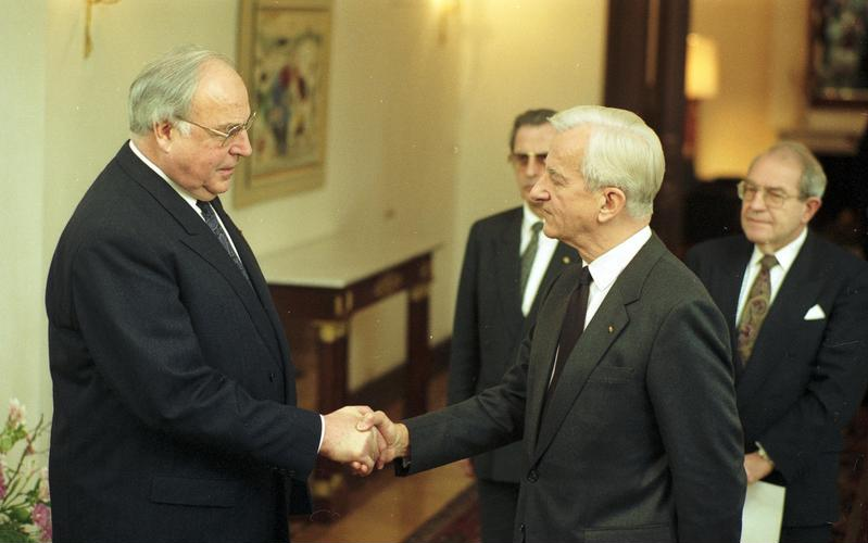 Bonn, 18. 1.1991 Bundespräsident Dr. Richard von Weizsäcker händigt den Bundesministern des neuen Kabinetts von Bundeskanzler Dr. Helmut Kohl die Ernennungsurkunden sowie den ausscheidenden Bundesministern die Entlassungsurkunden aus - in der Villa Hammerschmidt